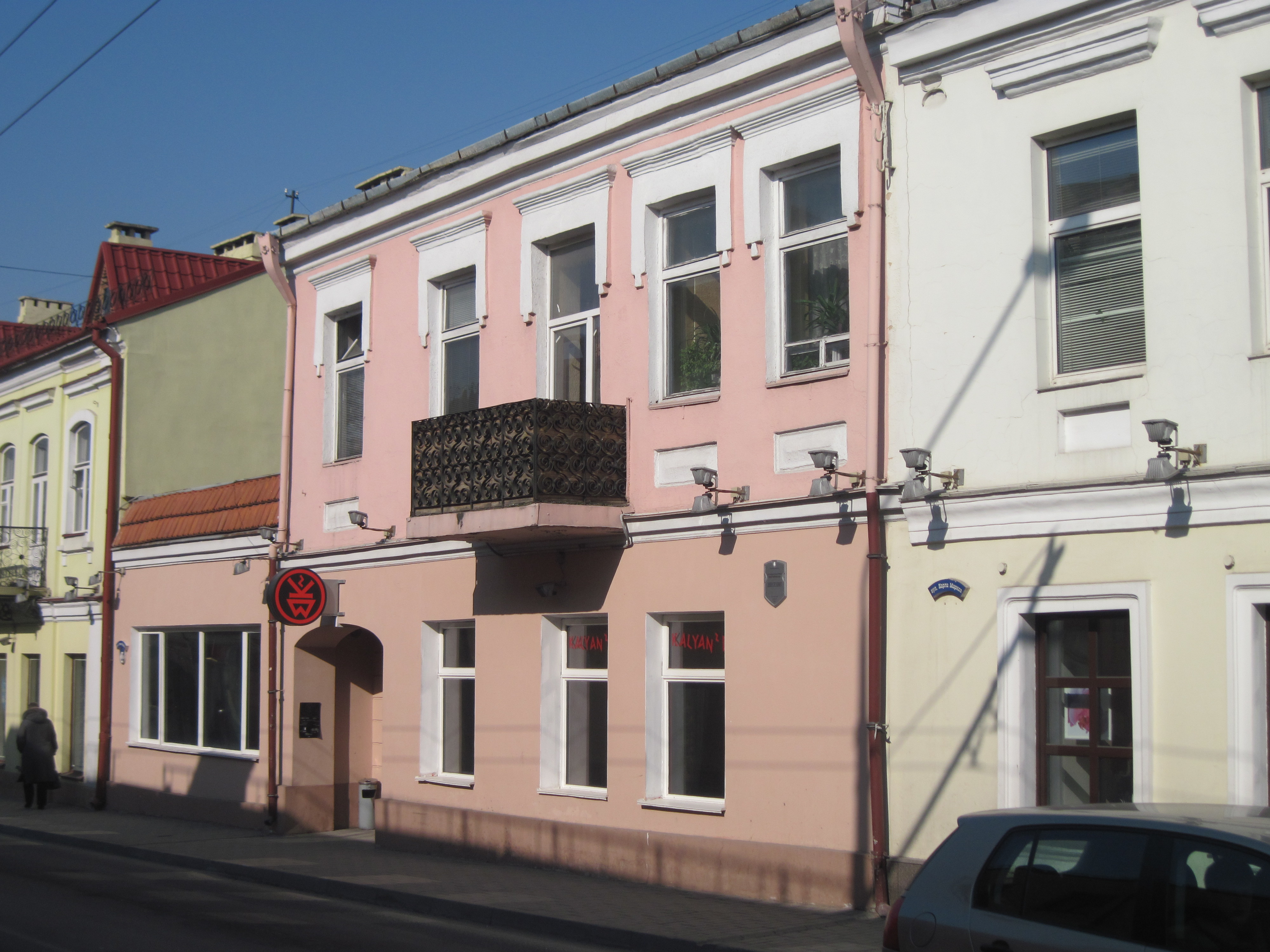 Забудова гістарычнага цэнтра Гродна. Вуліца К. Маркса, 10.